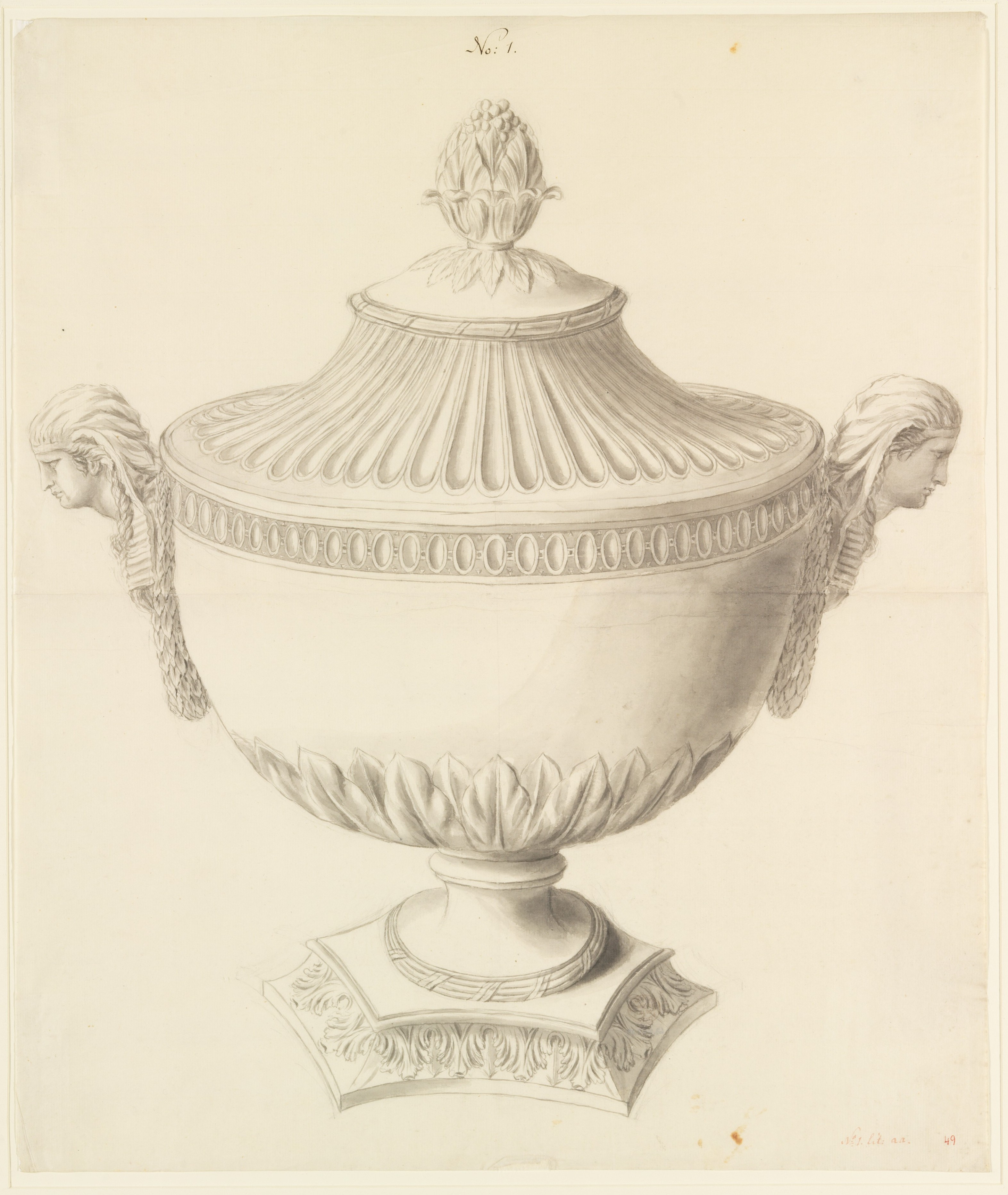 Drawing; Drawings